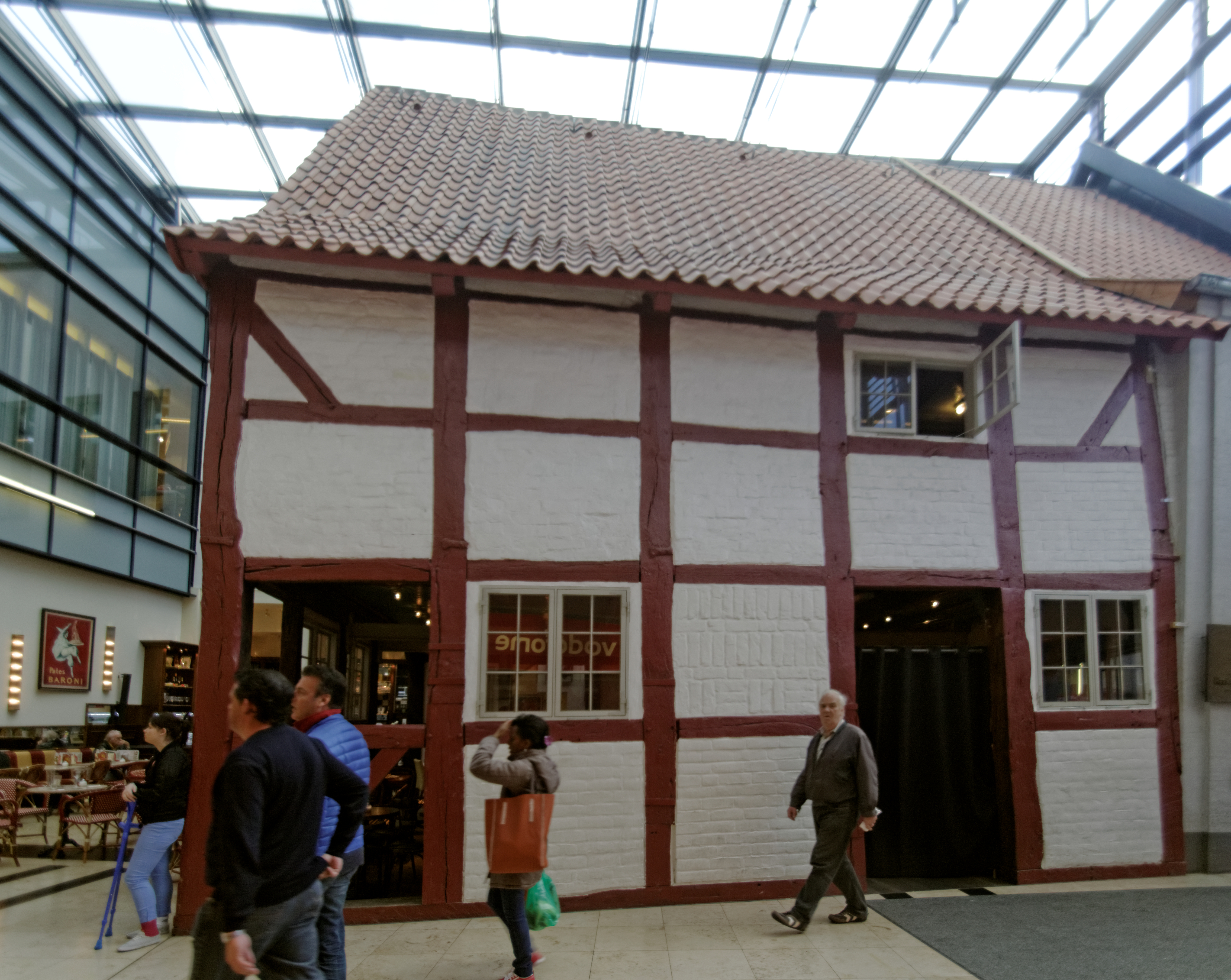 Flensburg, Holm 59; Kaufmannshof Rückflügel